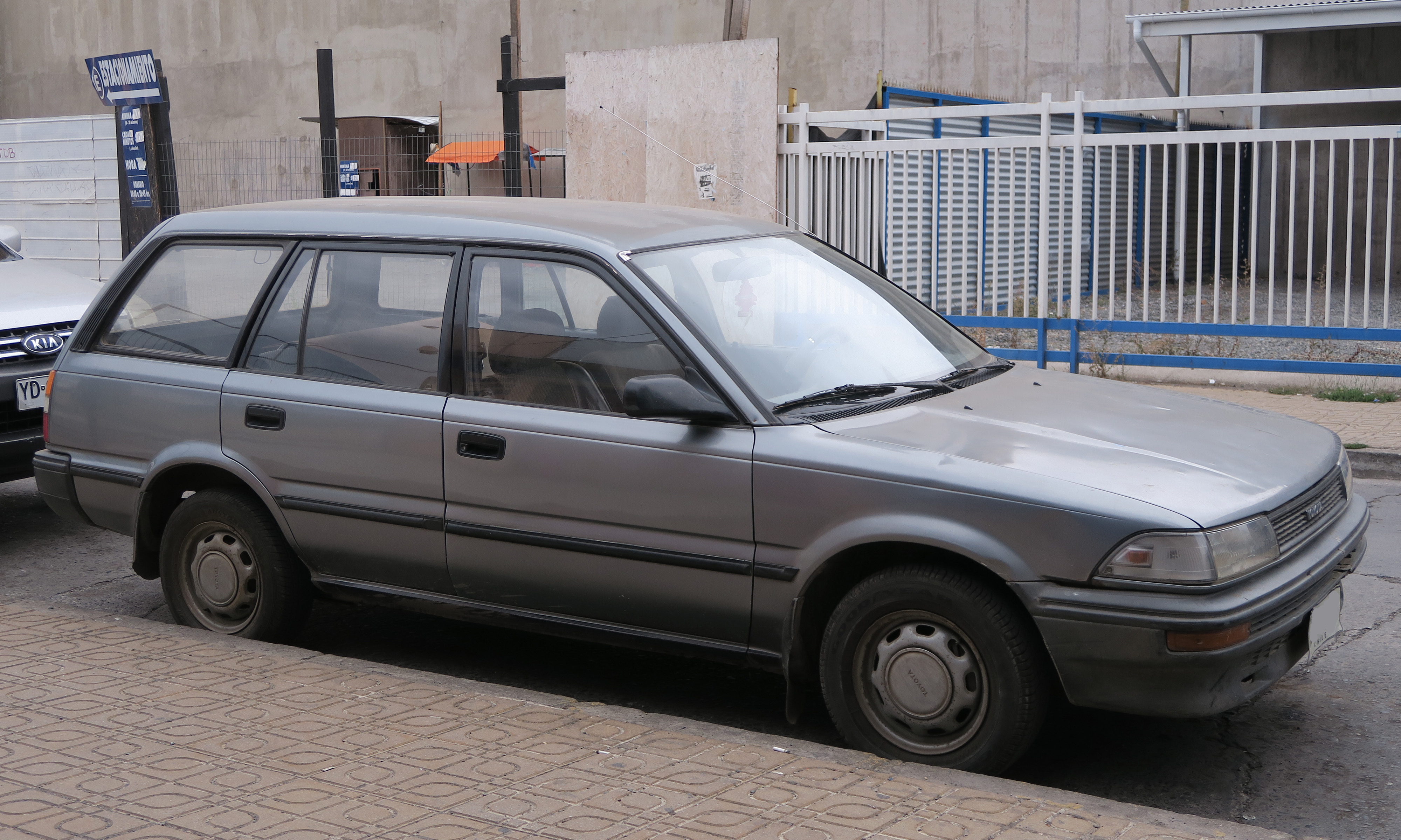 Toyota Corolla 1.3 XL Wagon 1989